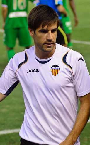 El capità merengot David Albelda